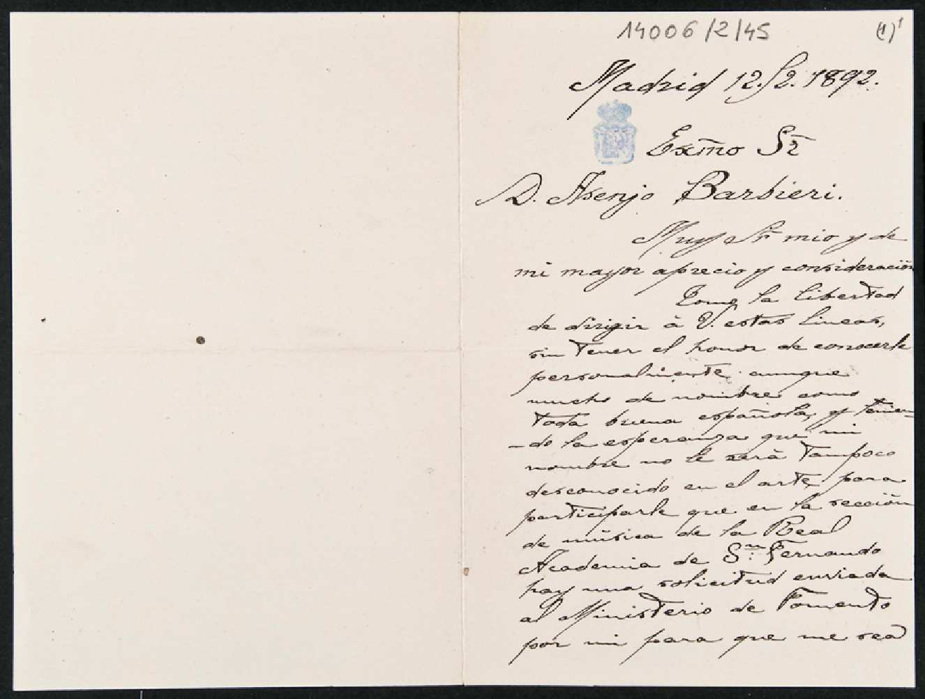 Carta Carolina Casanova de Cepeda a Barbieri, páxina 1.